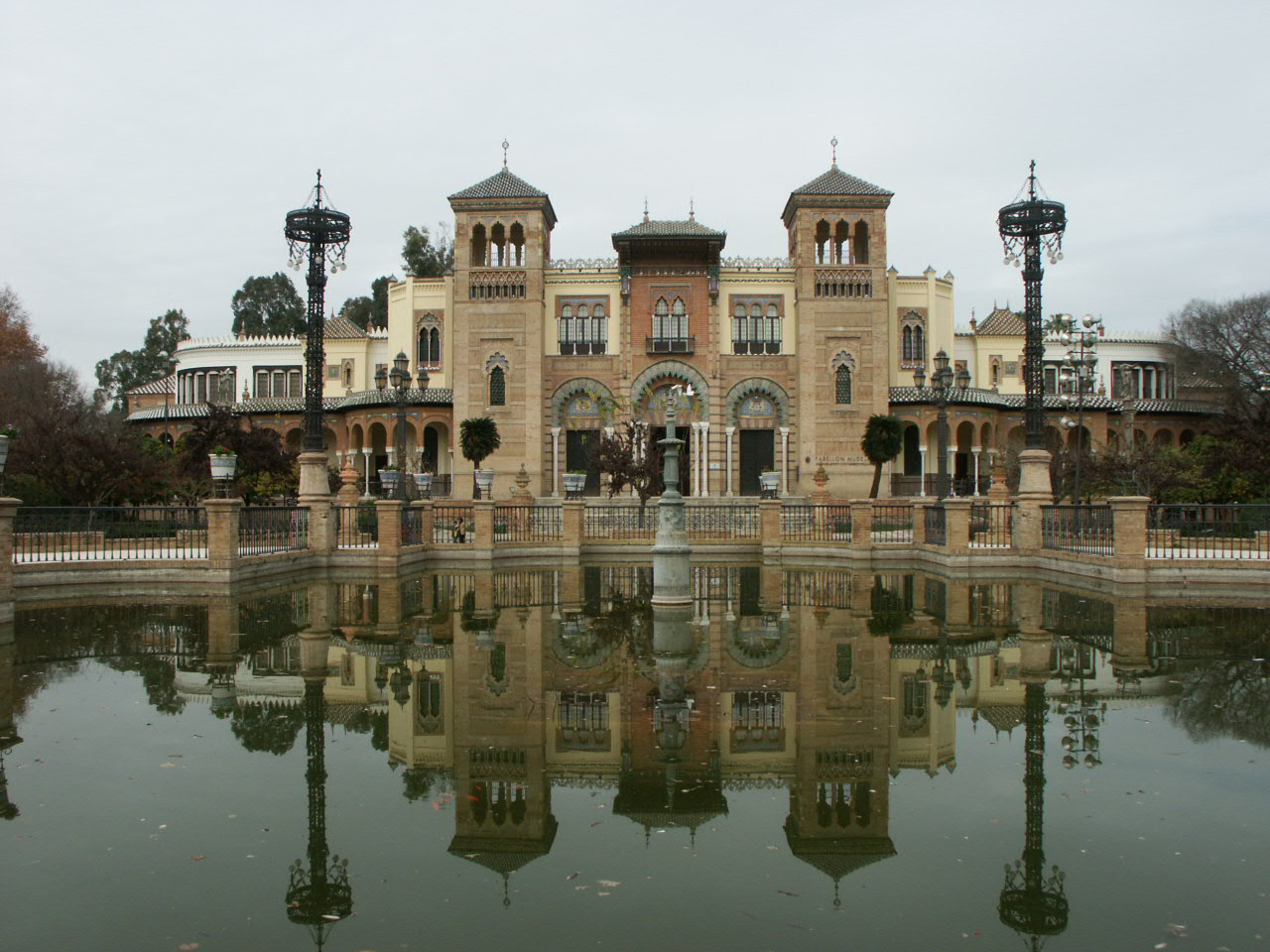 El Pabellon Mudéjar (Parque de María Luisa), actualmente Museo de Artes y Costumbres Populares de Sevilla, construido por Aníbal González para la Exposición Iberoamericana de 1929.